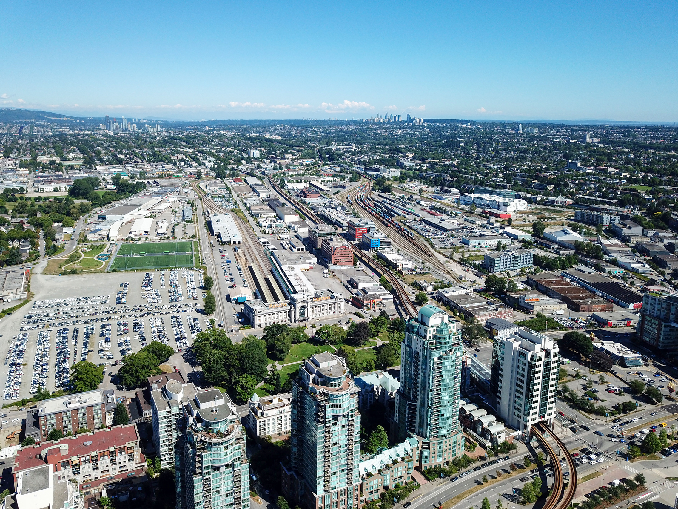 East Vancouver